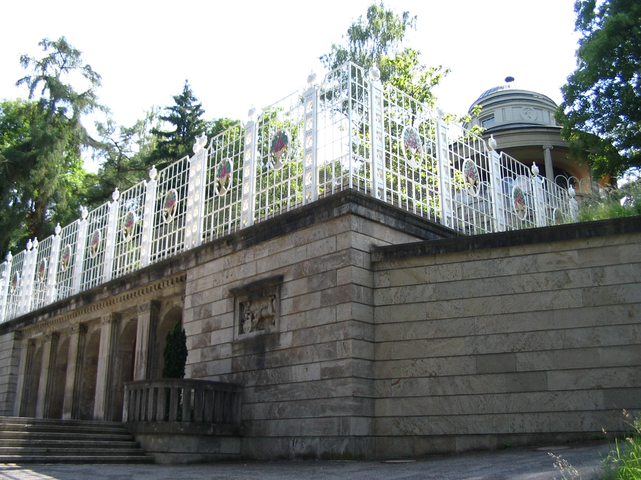 Eingang zum Marmorsaal (unten) und Teehaus (oben) im Weißenburgpark in Stuttgart